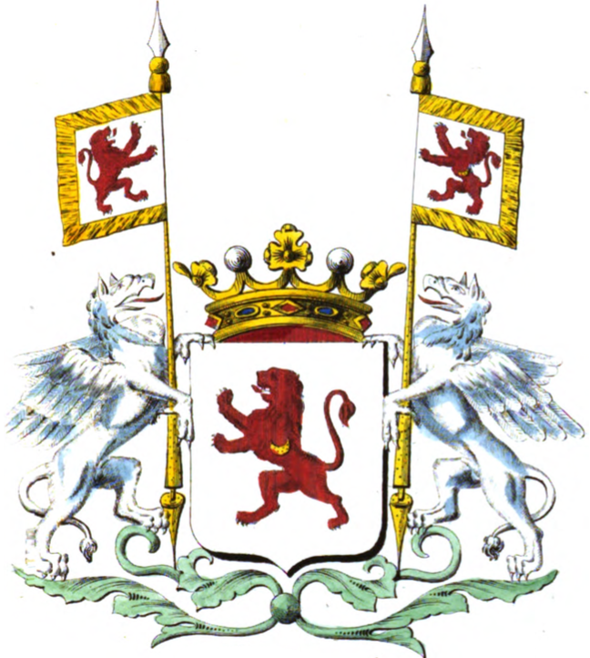 Armoiries de la famille de Grady